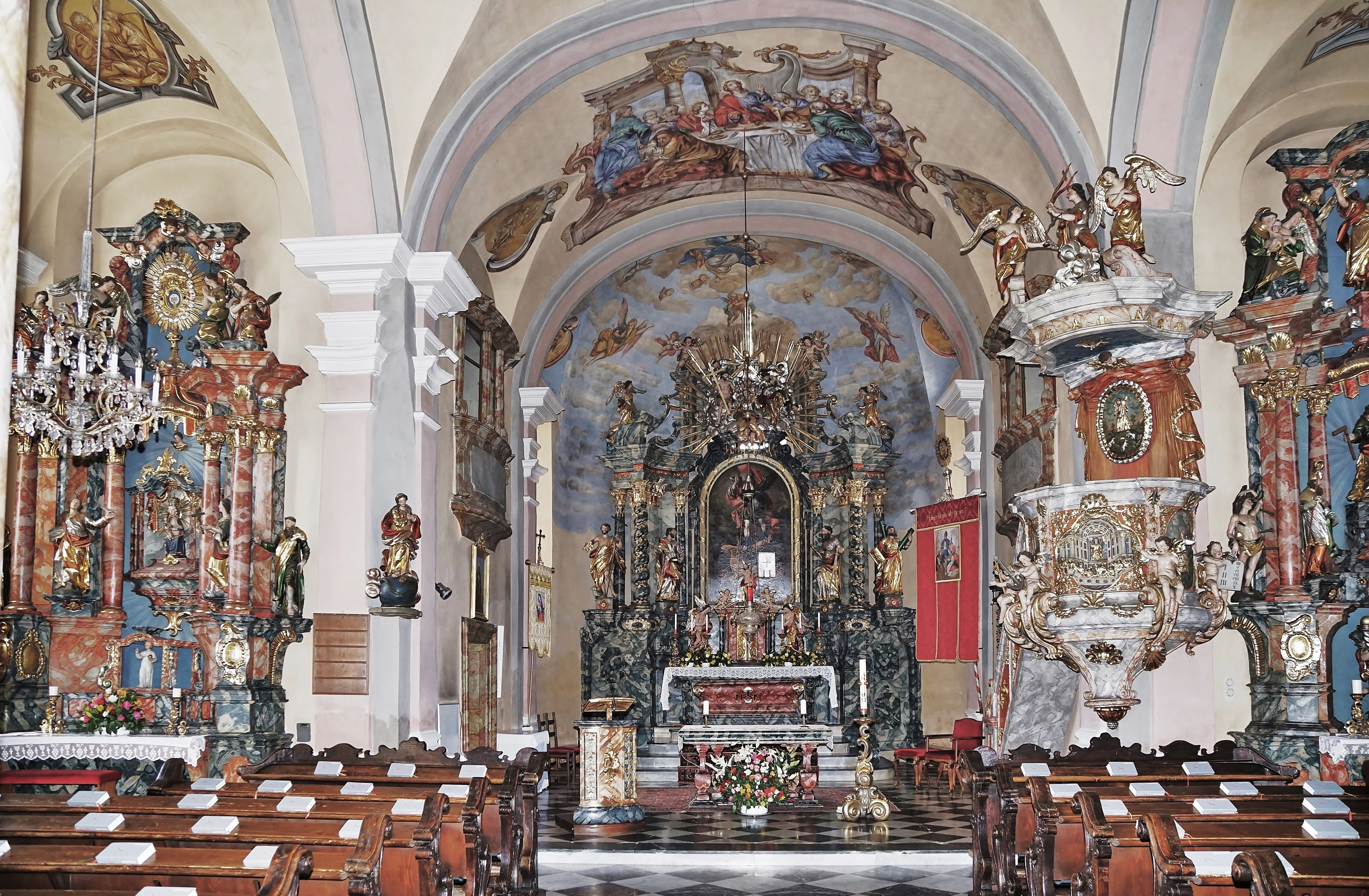 Kath. Pfarrkirche Hll. Michael und Georg (Moosburg in Kärnten), Innenansicht